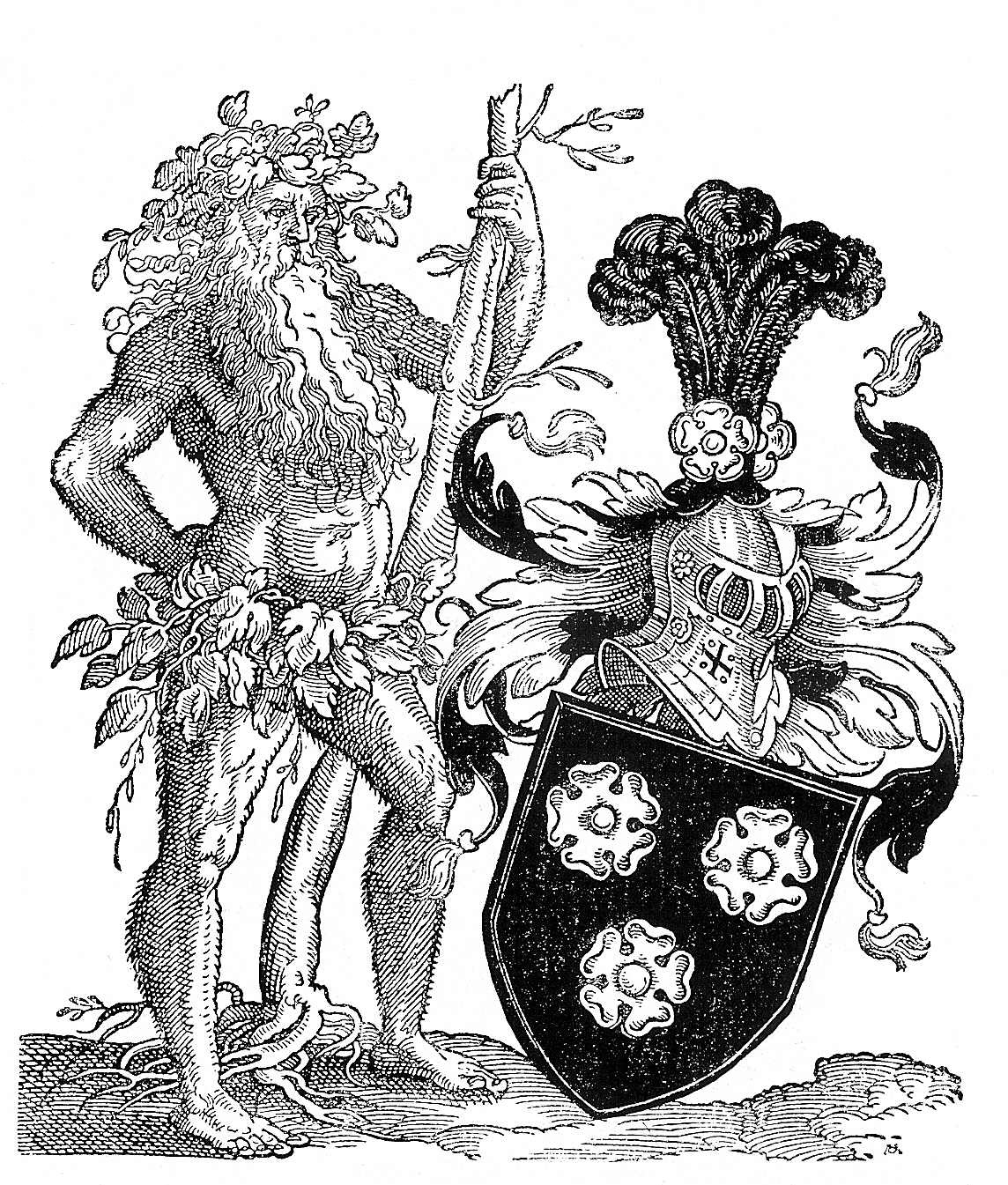 Wilder Mann mit Wappen der Holzhausen (In Schwarz drei silberne Rosen mit rotem Samen.)